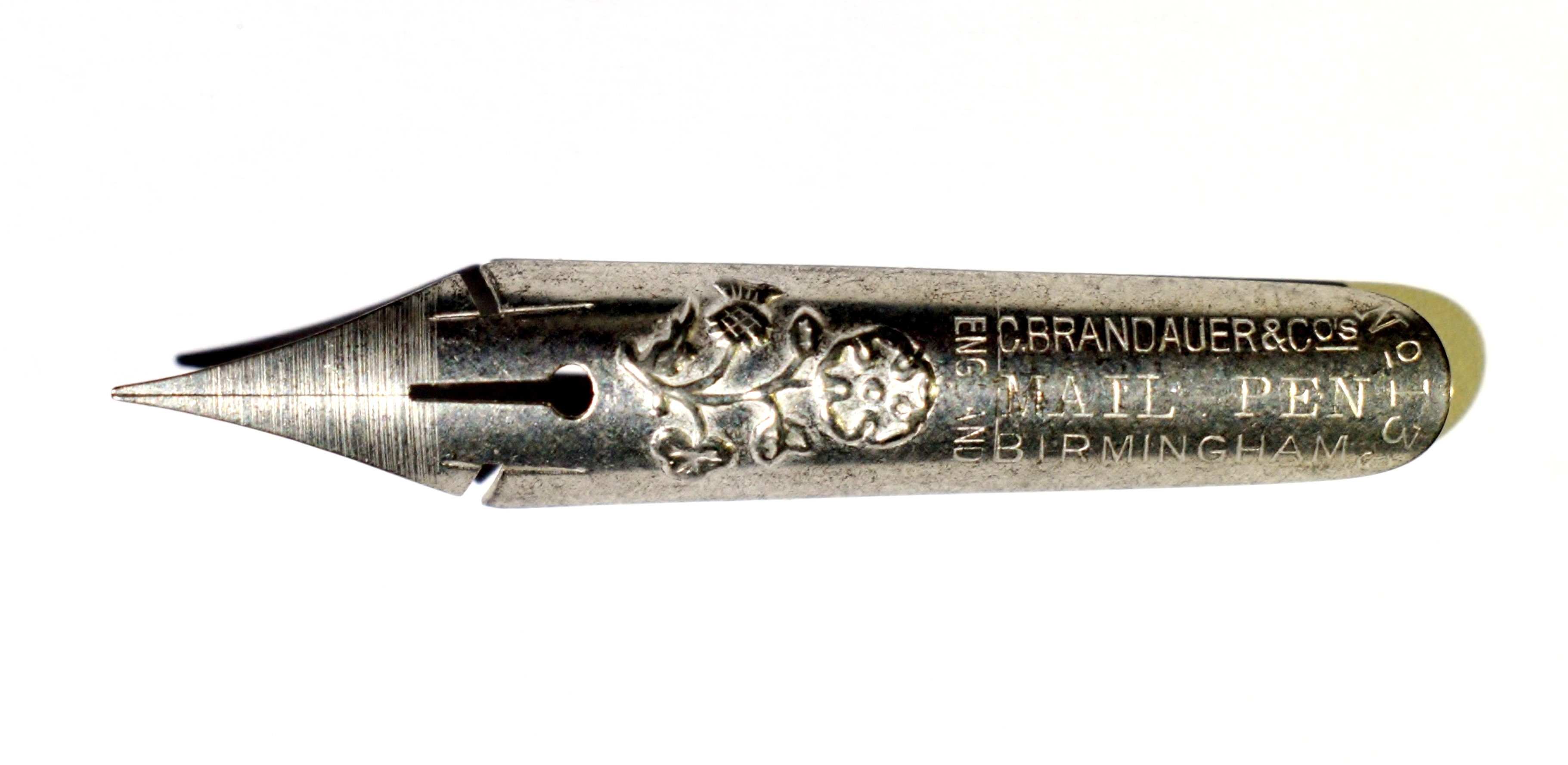 C. Brandauer & Cº — № 139 MAIL PEN